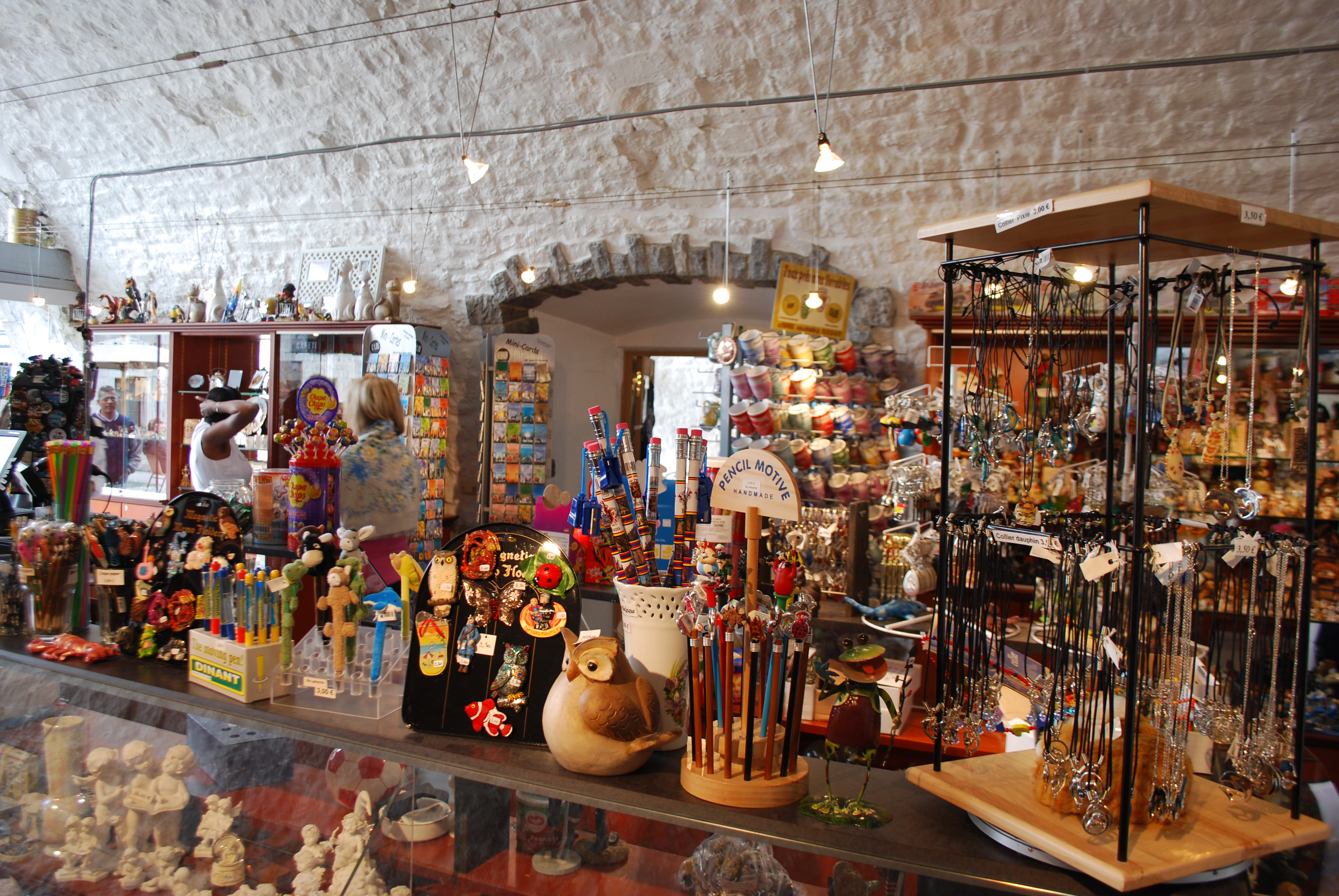 La boutique touristique de la citadelle de Dinant.